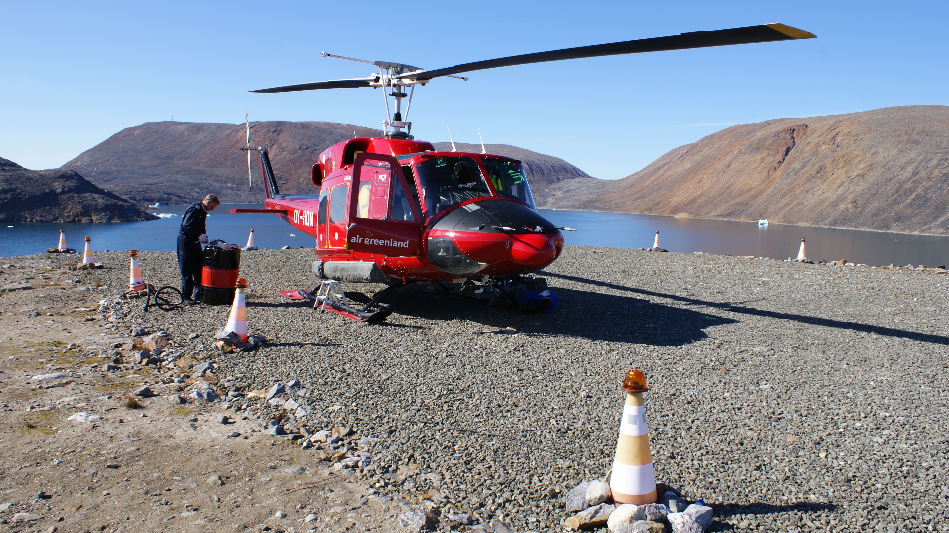 Air Greenland Bell 212 "Miteq" at Nuussuaq Heliport, Greenland.